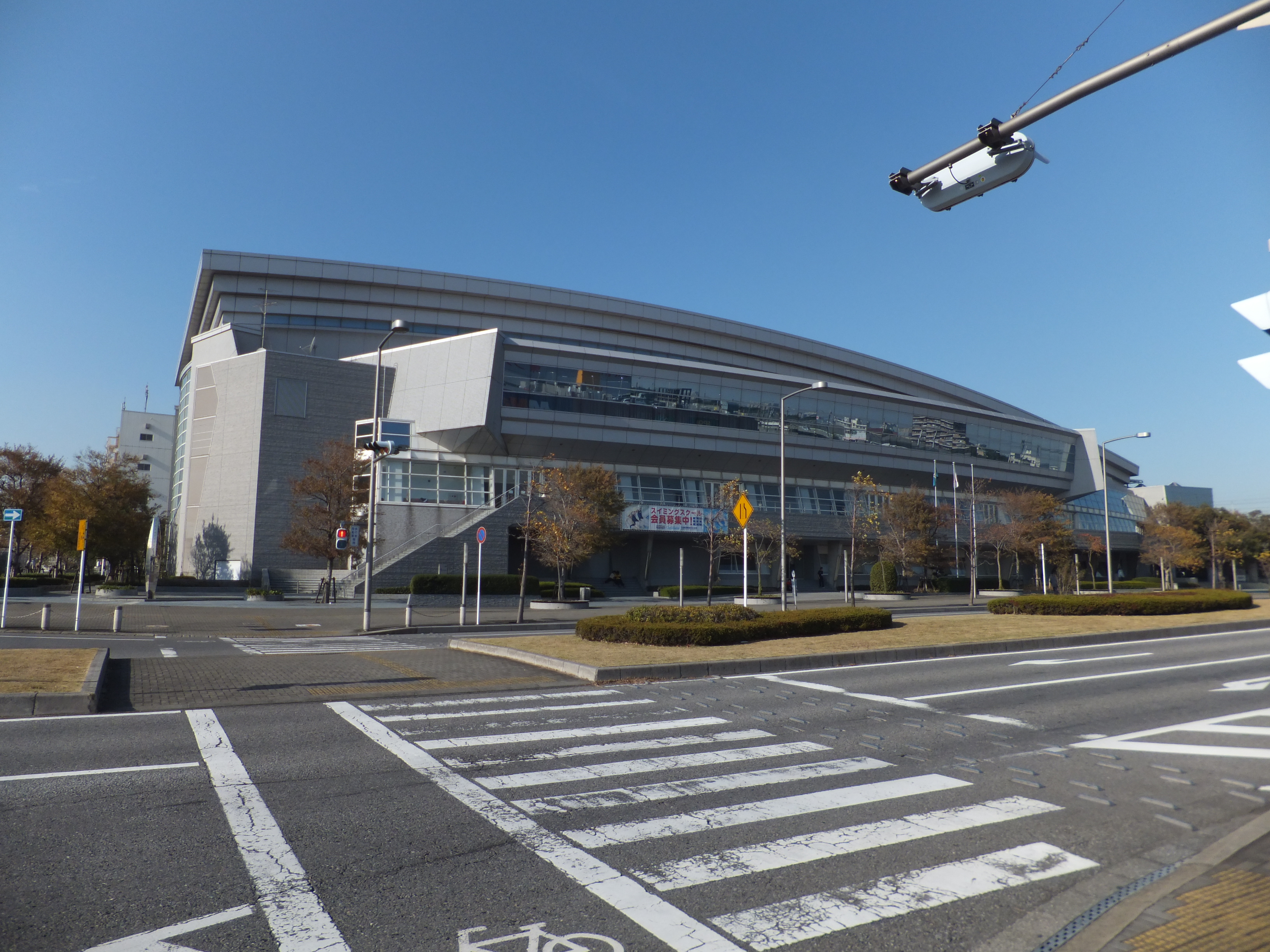 千葉県国際総合水泳場（千葉県習志野市）